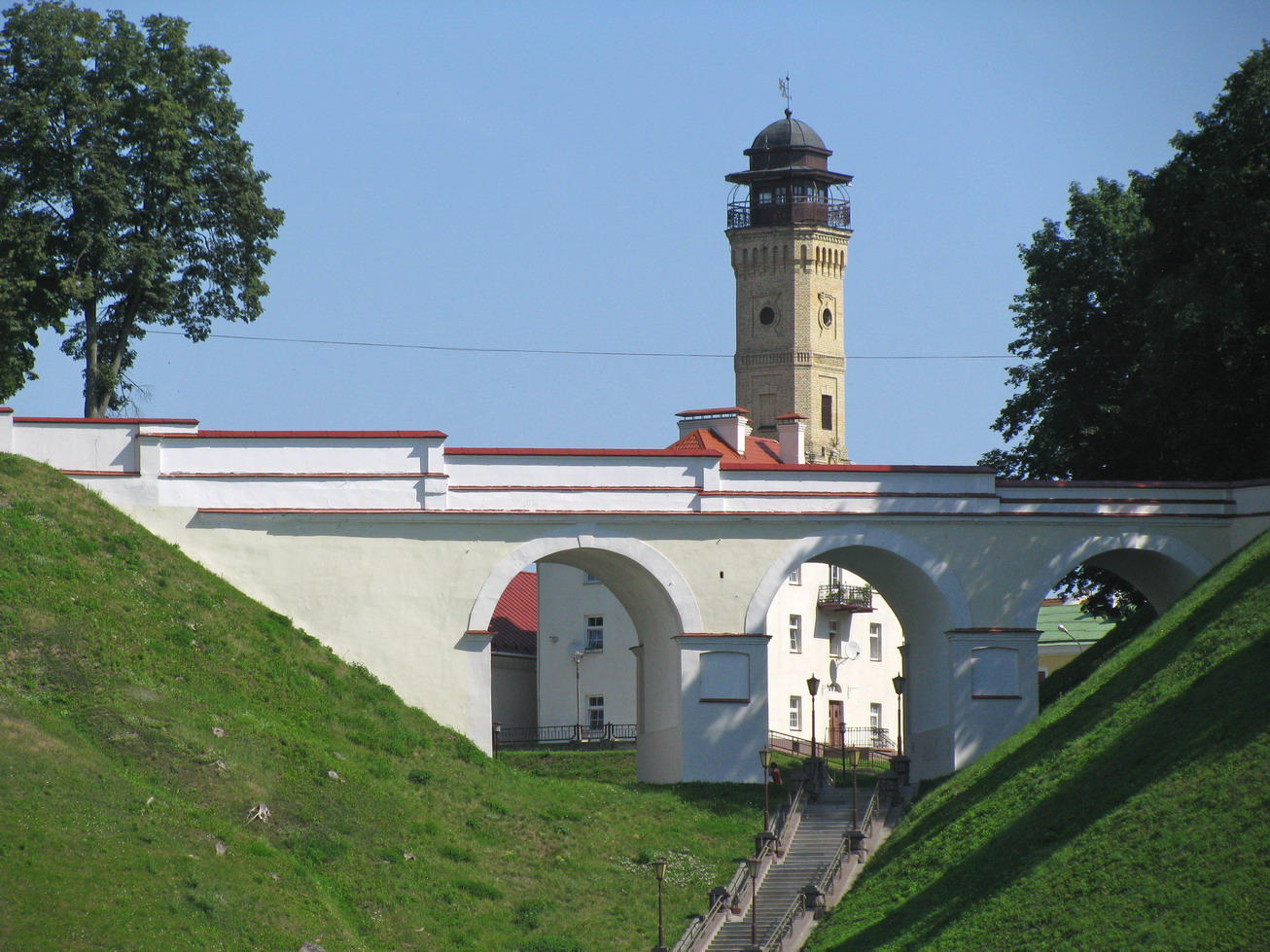 Беларуская (тарашкевіца): Мост Старого замка и пожарная башня